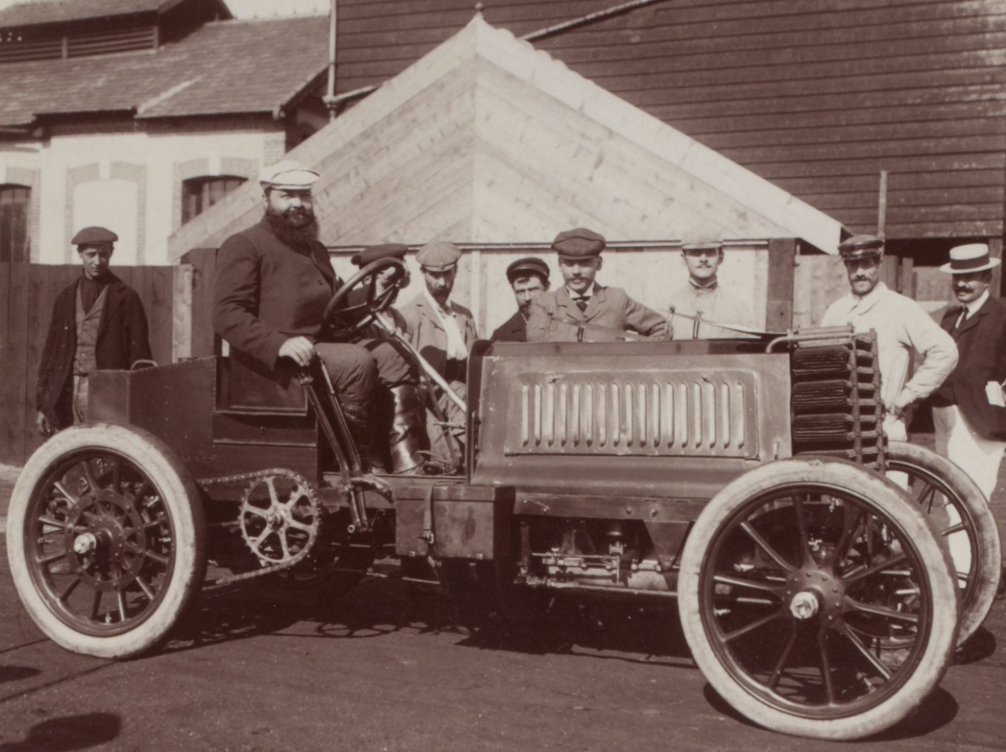 [Collection Jules Beau. Photographie sportive] : T. 19. Année 1902 / Jules Beau : F. 6. [Le Kilomètre, Deauville, 26 août 1902]